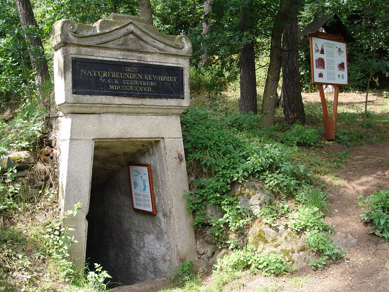 Der Vulkan Komorní hùrka (deutsch: Kammerbühl) bei Františkovy Lázně (Franzensbad) (2005)